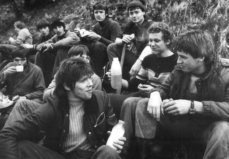 Schleusingen, Forstarbeiterbrigade, Pause ADN-ZB Schaar 16.5.85 Bez. Suhl: Jugend. die zeitweilige freiwillige Jugendbrigade "Karl Marx", die sich das Ziel gestellt hat, bei der Aufarbeitung der Bruchschäden im Wald zu helfen, besteht seit drei Jahren in Schleusingen. Die Jugendlichen, Kfz-Schlosser, Lehrlinge oder Stundenten, haben sich für 1985 einiges vorgenommen. 500 Festmeter sollen es bis zum XII. Parlament der FDJ sein. Gute Stimmung herrscht in der Frühstückspause. -siehe auch 1985/0516/7 und 9N